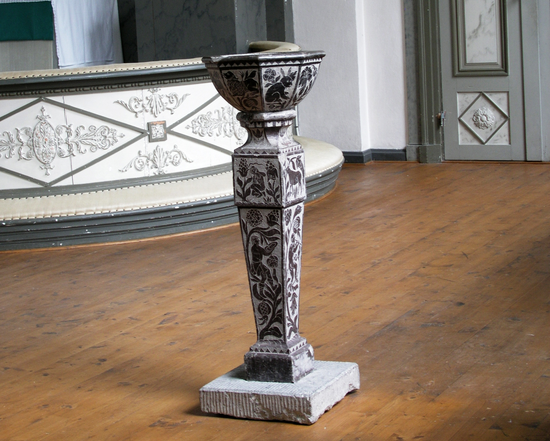 Röks kyrka, baptismal font